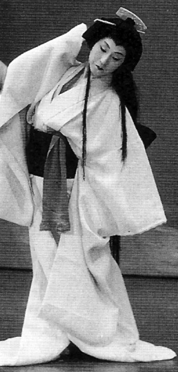 雪組「四つのファンタジア」より、天津乙女(Amatsu Otome)のアップ